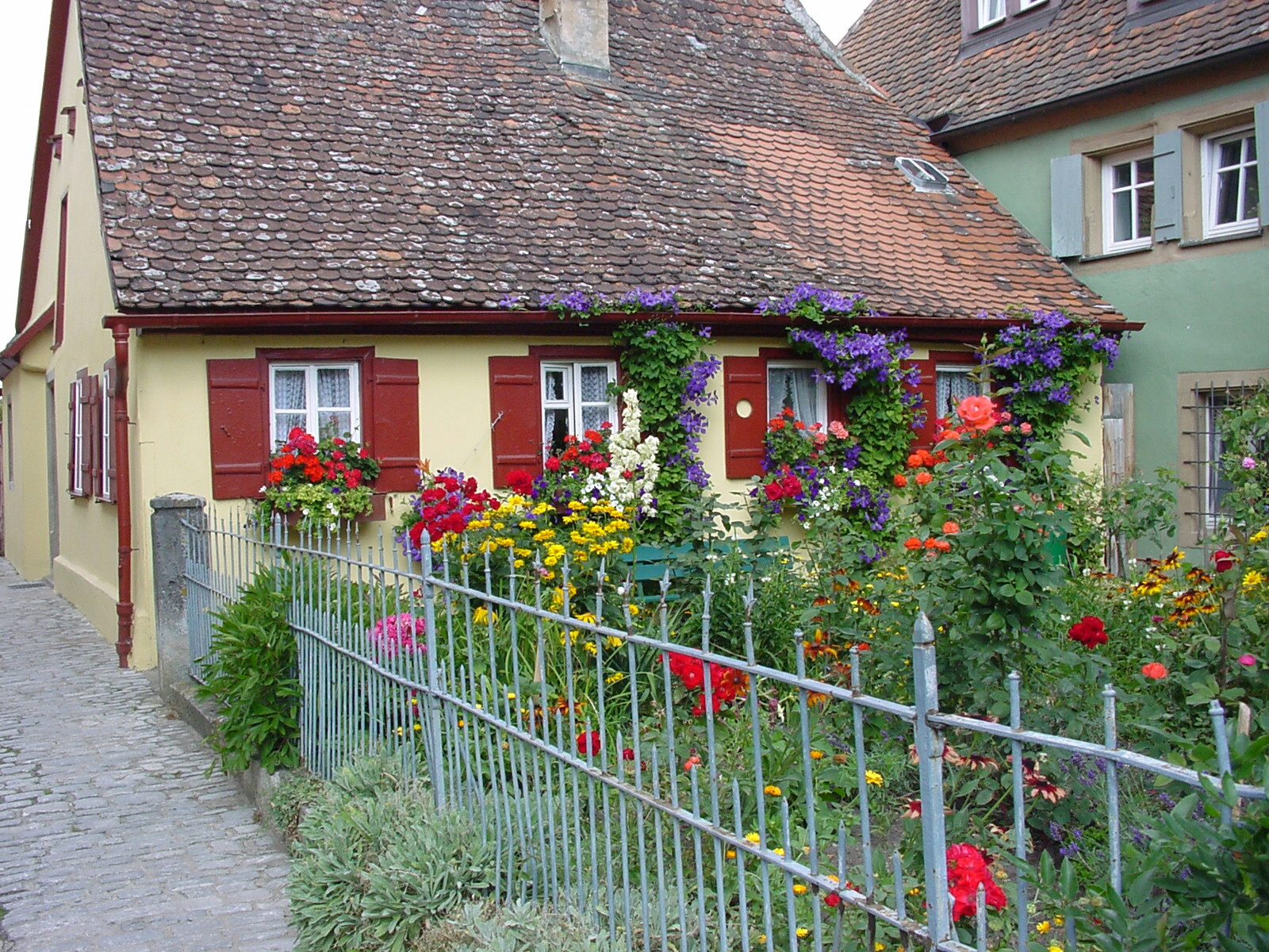 Bauerngarten in Rothenburg / Tauber